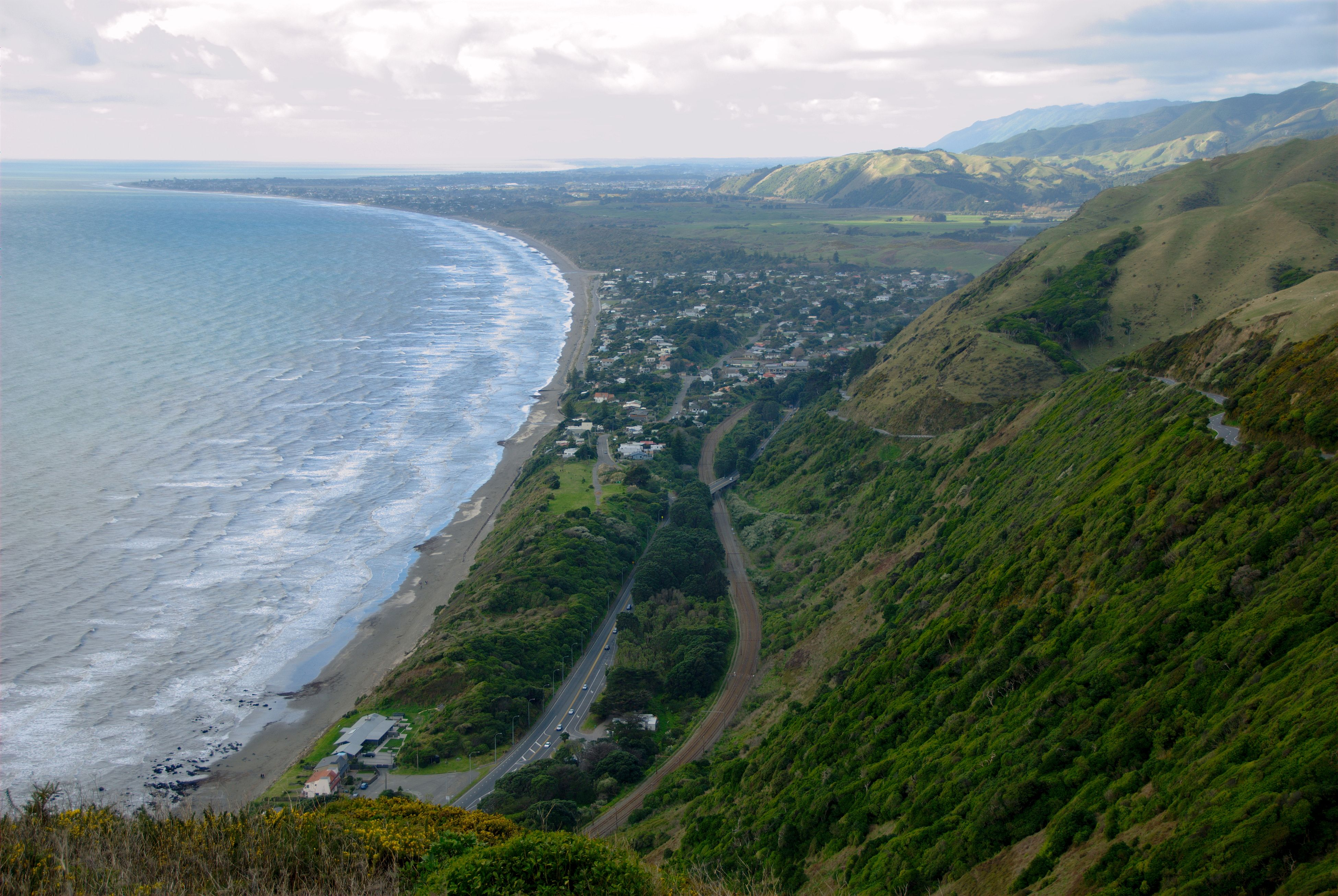 Paekakariki Township & Beach, from Paekakariki Hill